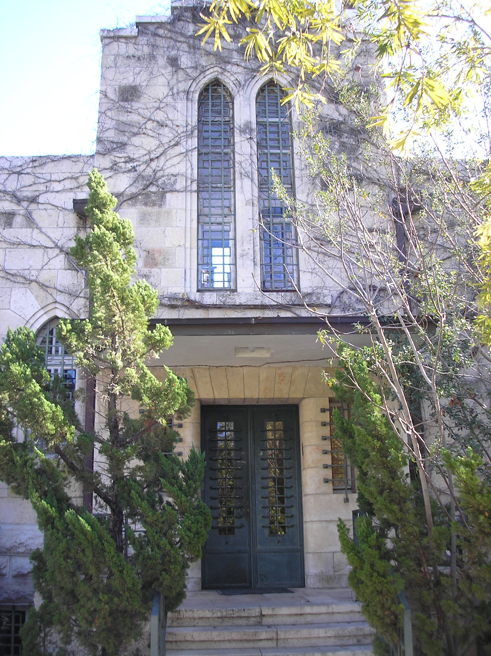 Vila Morkus